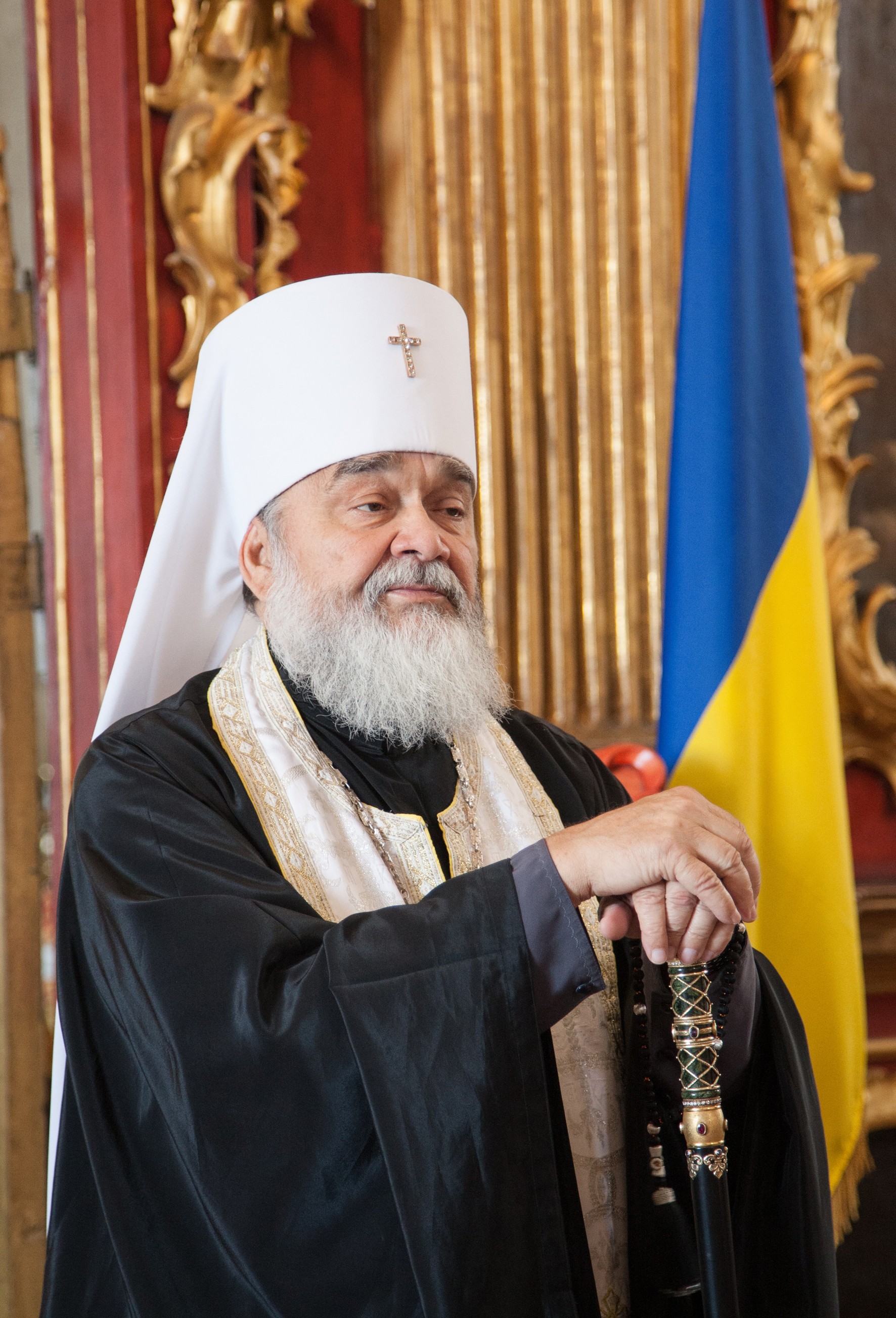 Предстоятель УАПЦ митрополит Мефодій в Андріївській церкві.